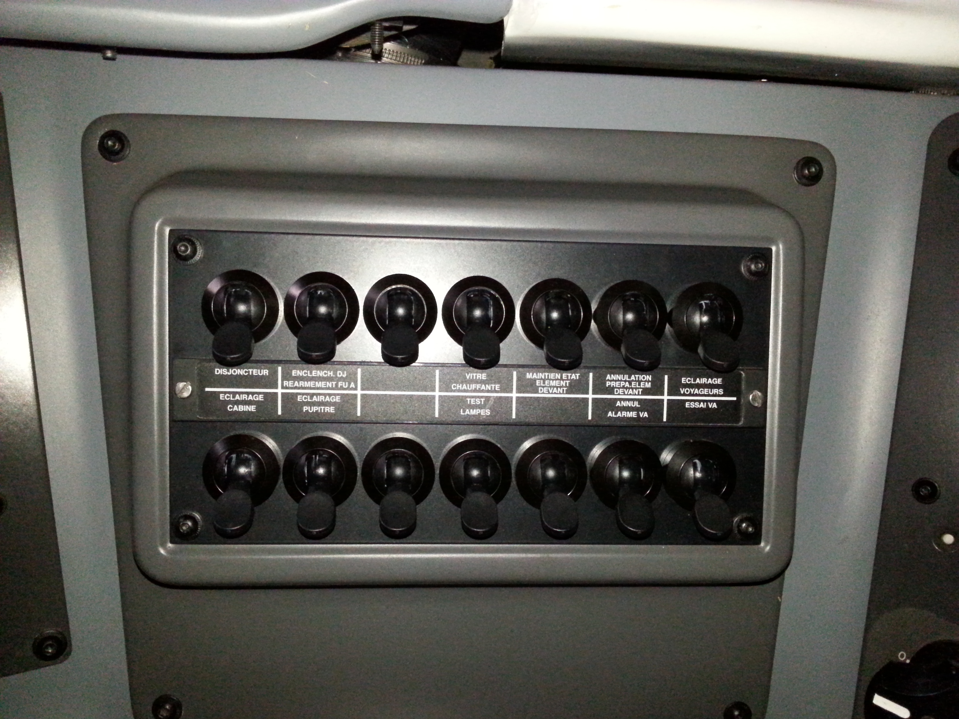 Zoom sur les interrupteurs à droite du conducteur, dans une Z50000.